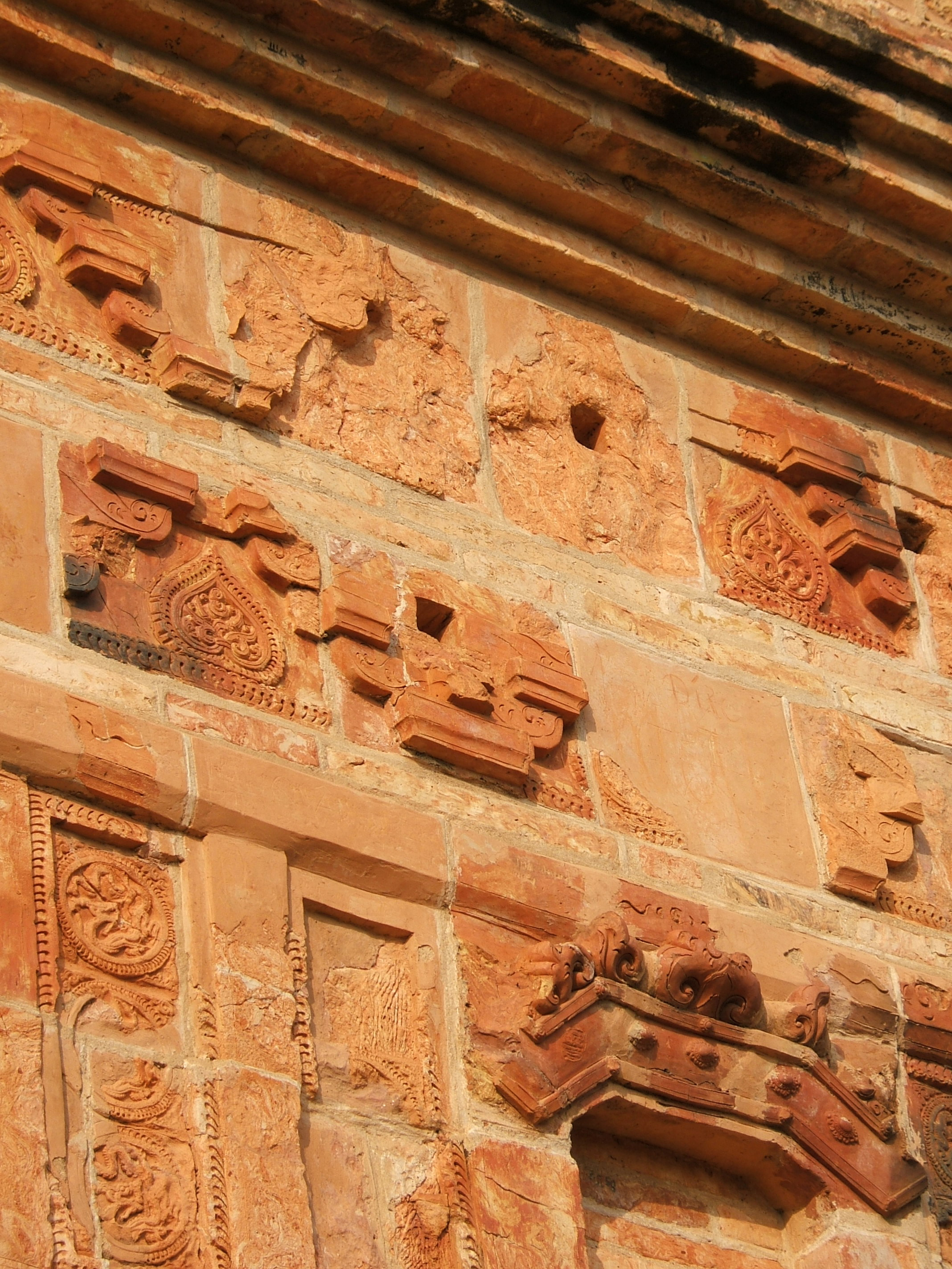 Trang trí trên gạch nung của tháp Bình Sơn